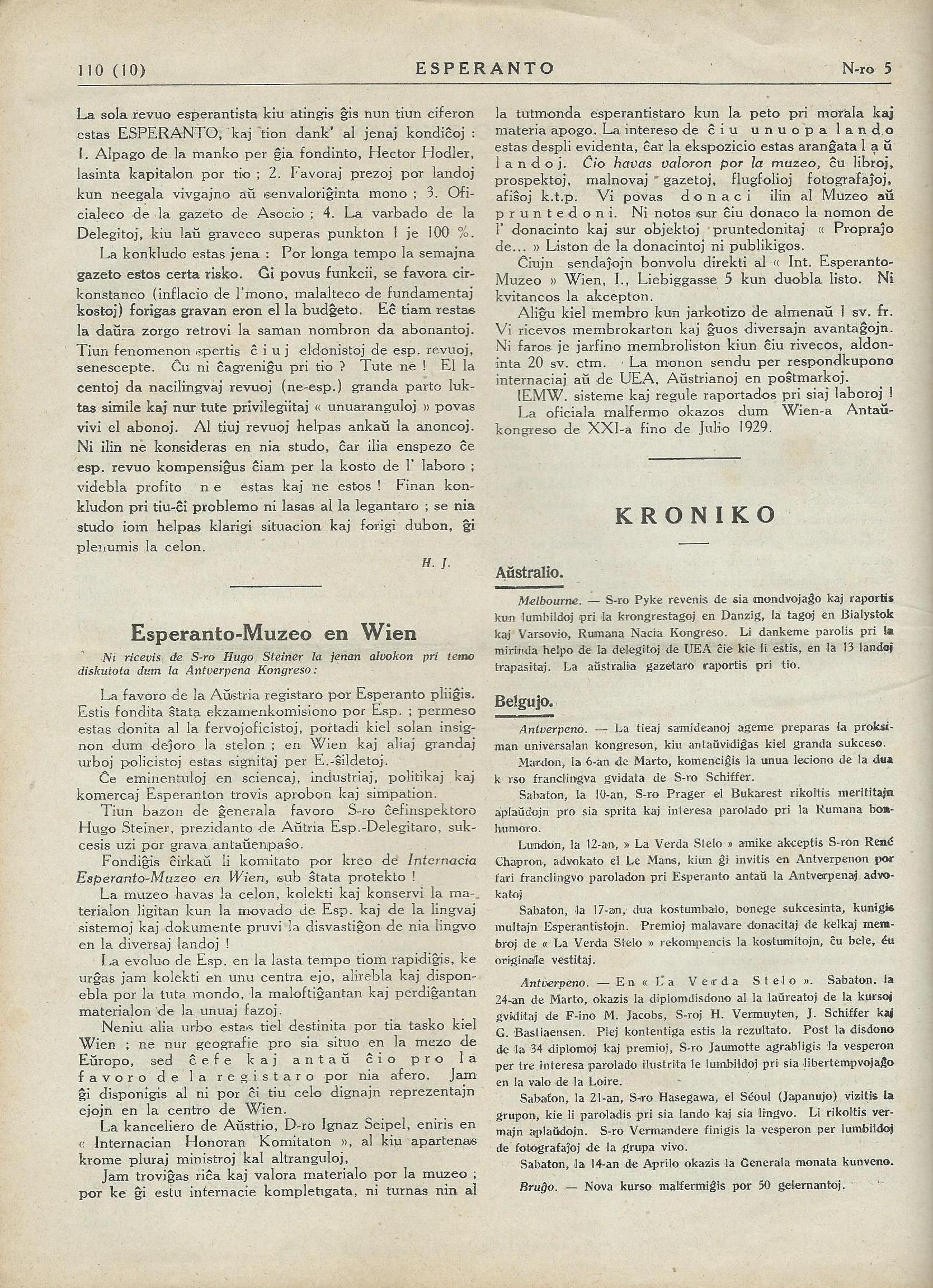 el la revuo "Esperanto", 1928